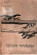 "Песні жальбы". Вільня